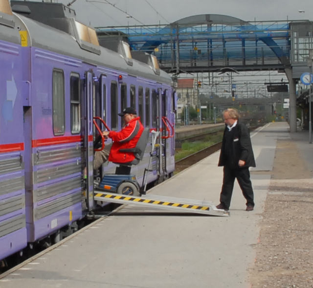 Schuifplank van SJ X11. Deze plank wordt onder het balkon geschofen en kan aan beide zijden er uit getrokken worden.